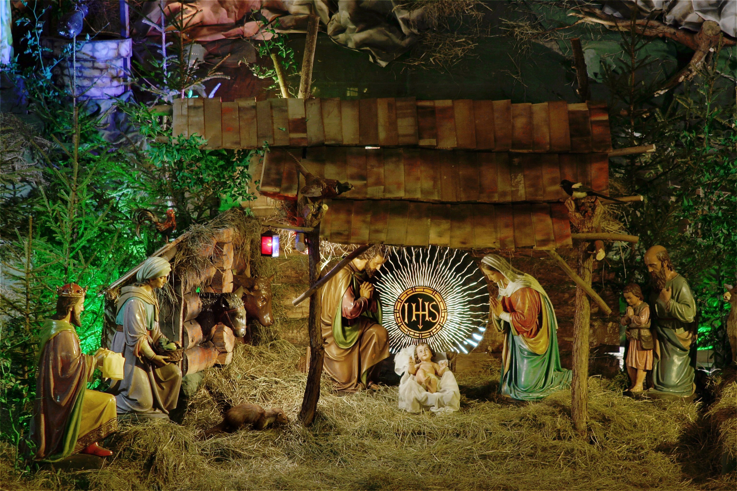 Crib in Katowice Panewniki, Poland (2005)